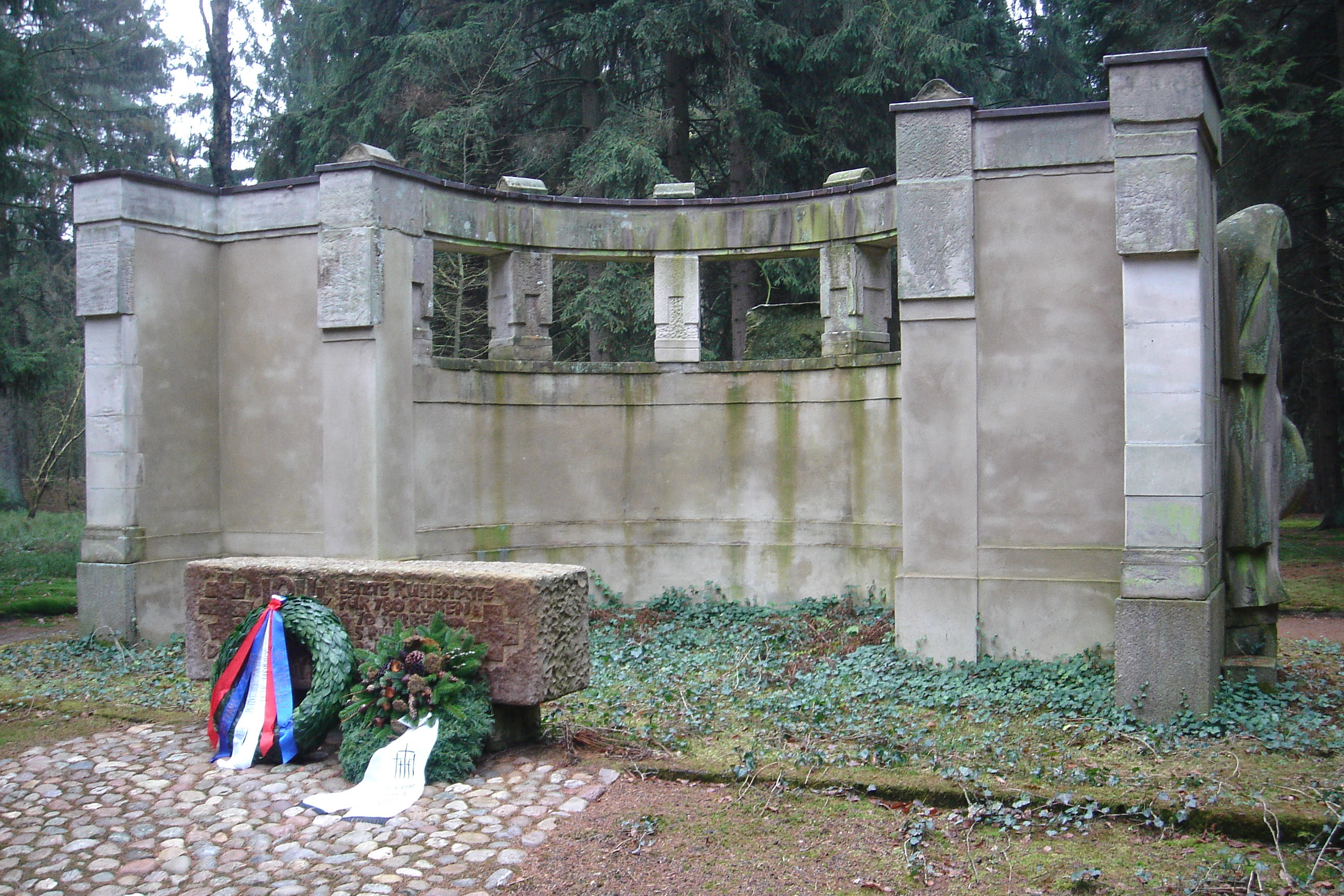 Lager Soltau (First World War) cemetery (Kriegsgefangenenfriedhof Ahlften), memorial